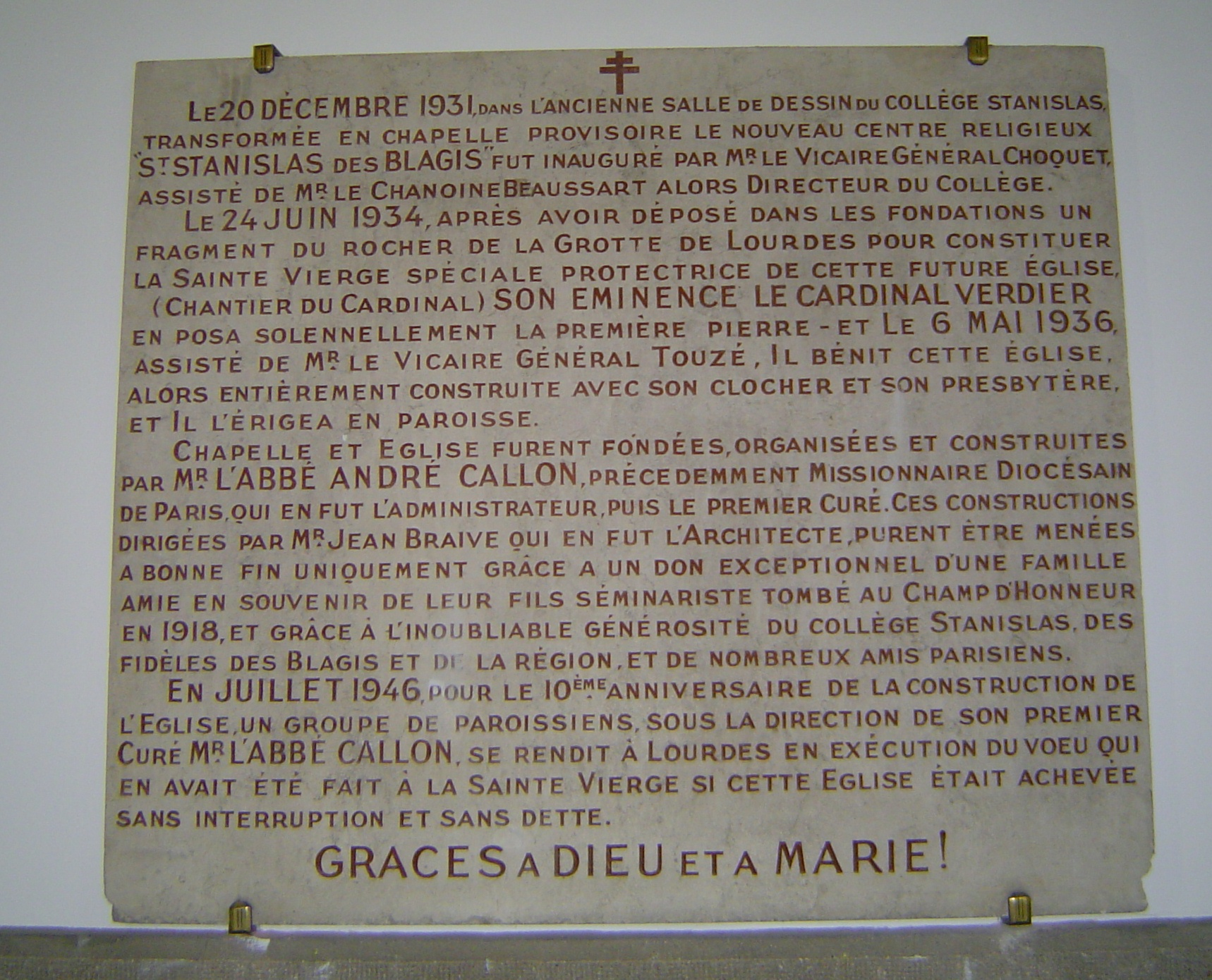 Plaque dans l'église Saint-Stanislas, quartier des Blagis, Fontenay-aux-Roses.